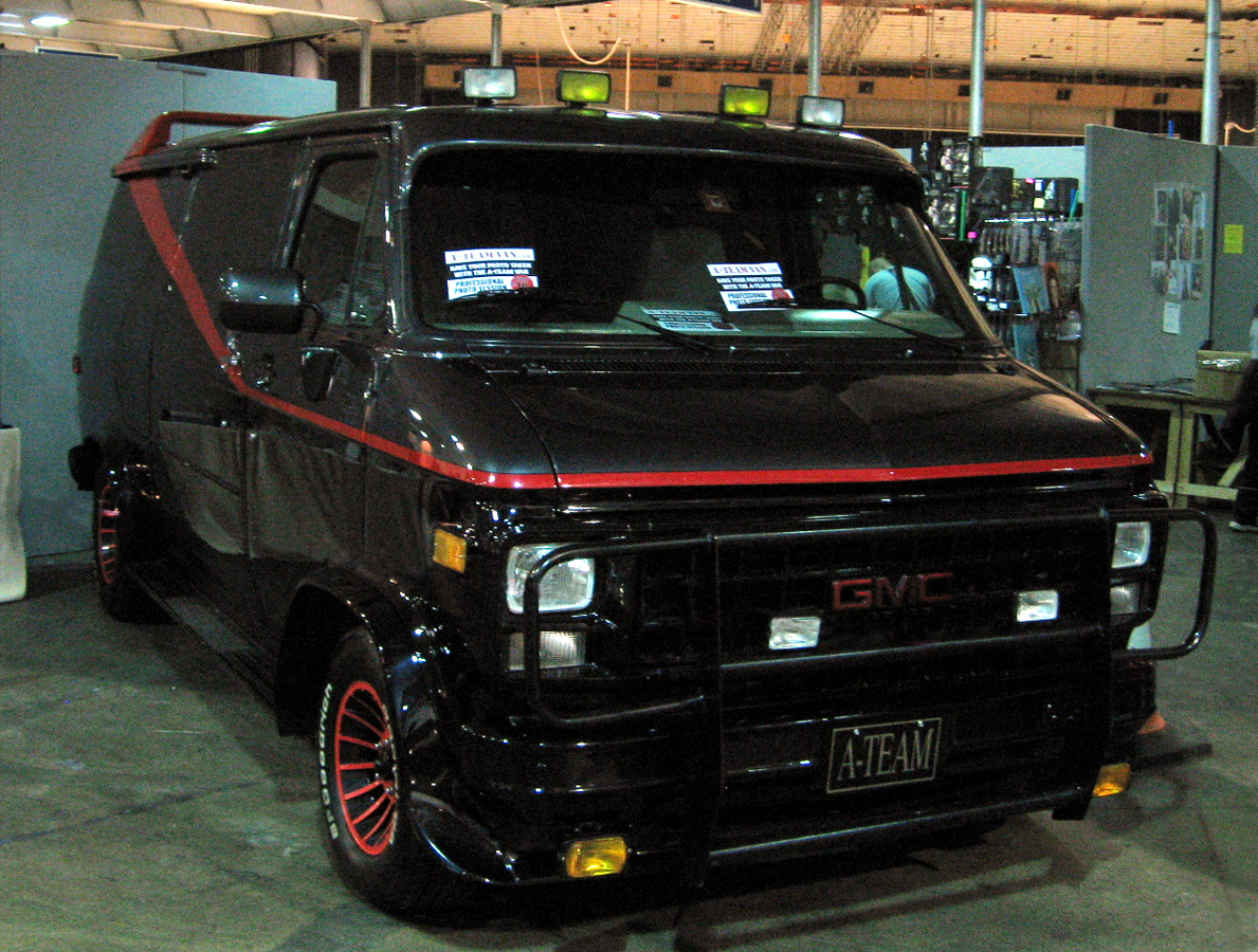 Der Van des A-Teams ist ein GMC Van der 1983er G-series. Vermutlich handelt es sich bei B.A.s Van um einen G-15 (500kg Zuladung möglich. Der Motor (5,7 l V8) hat ungefähr 240 PS, modifiziert in den Bereichen Luftzufuhr und Vergaser.